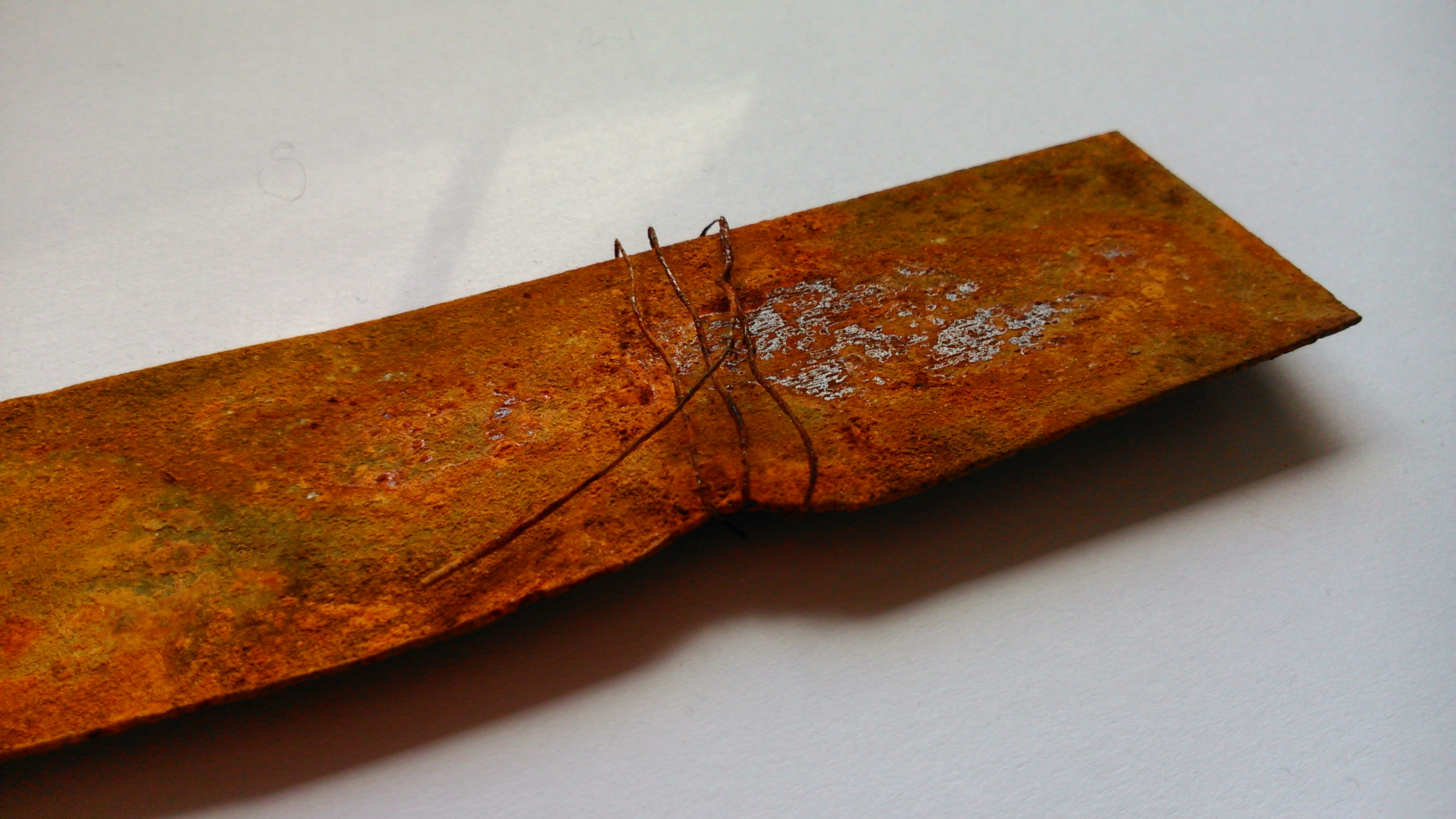 Et stykke jern oxideret ved elektrolyse